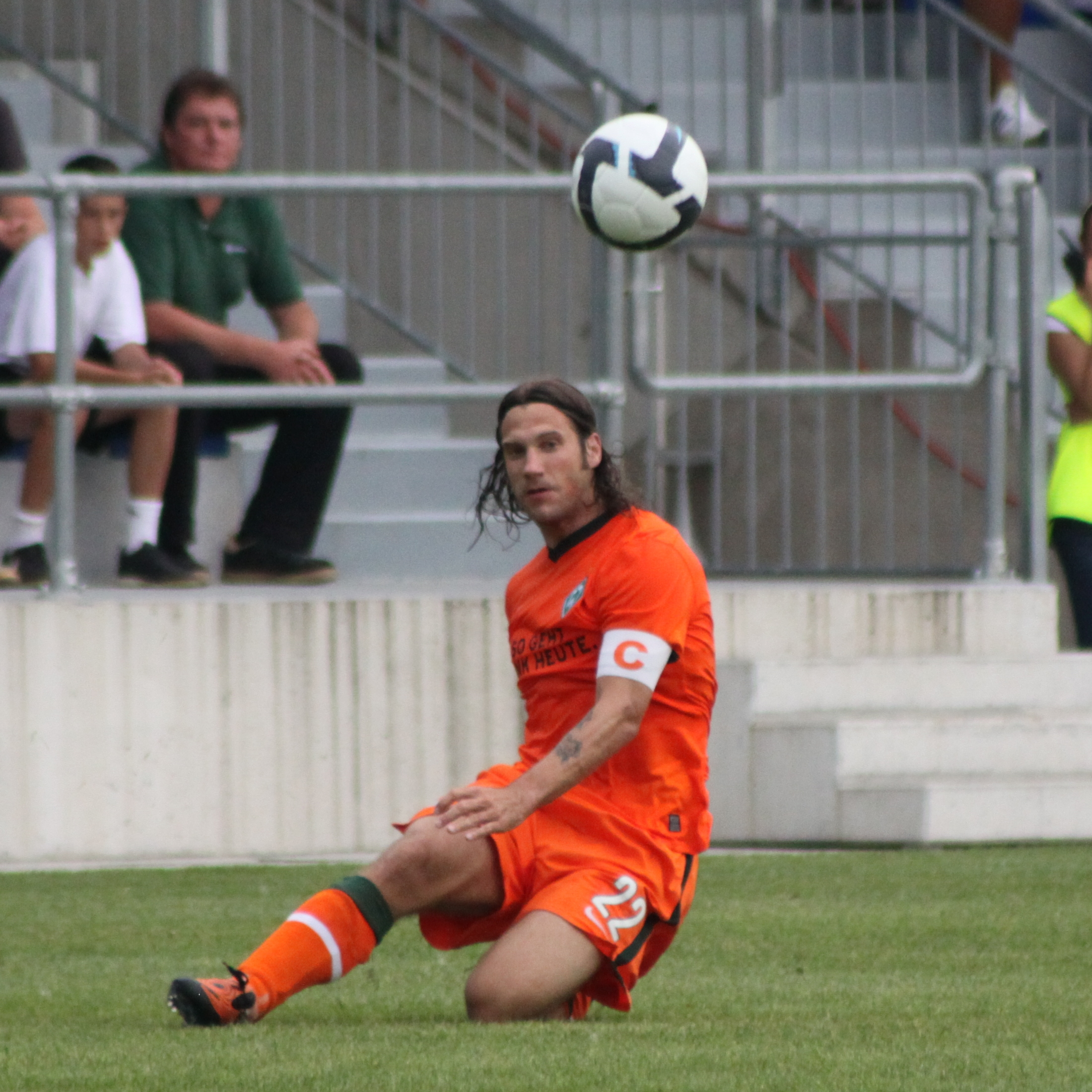 Torsten Frings - SV Werder Bremen (4)